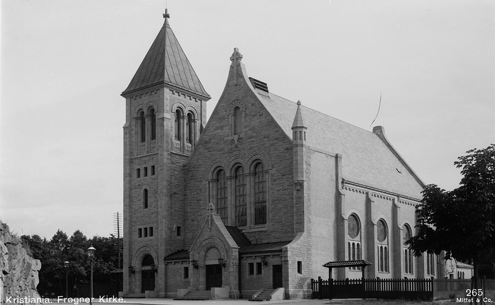 Frogner kirke i Kristiania (Oslo). Antagelig 1908.